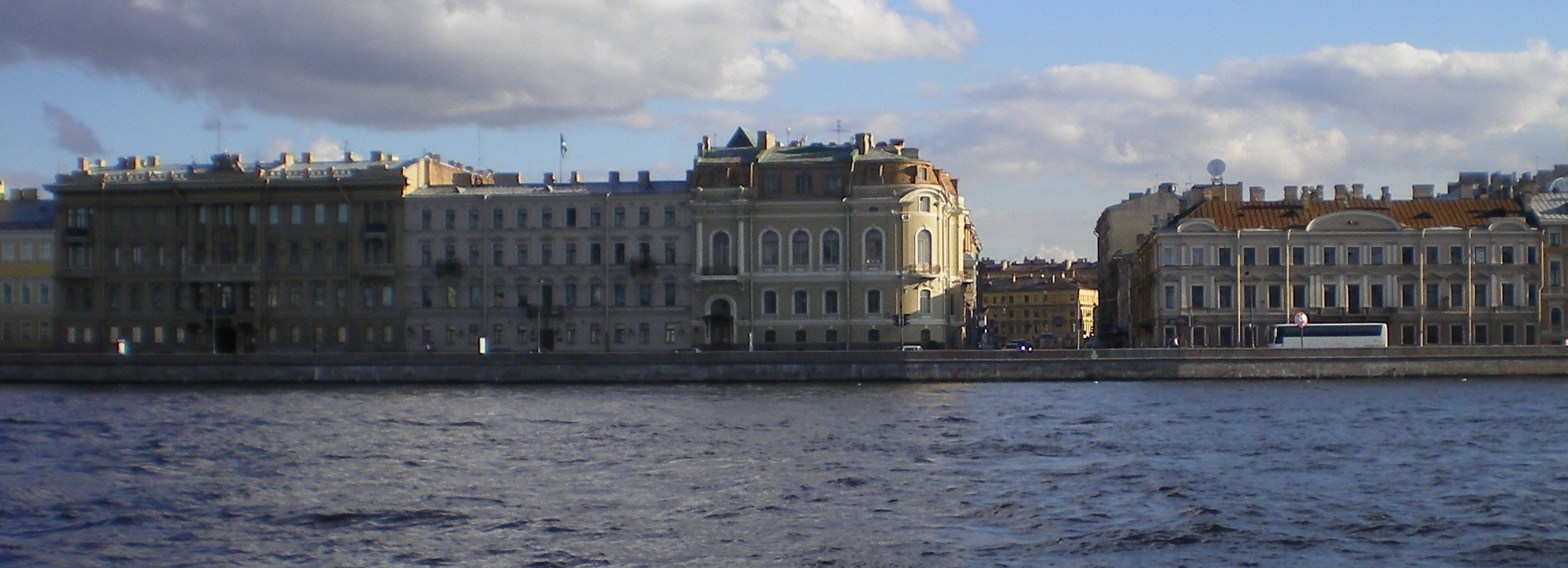 Набережная Кутузова дома 20-24, вид с Невы. Гагаринская улица